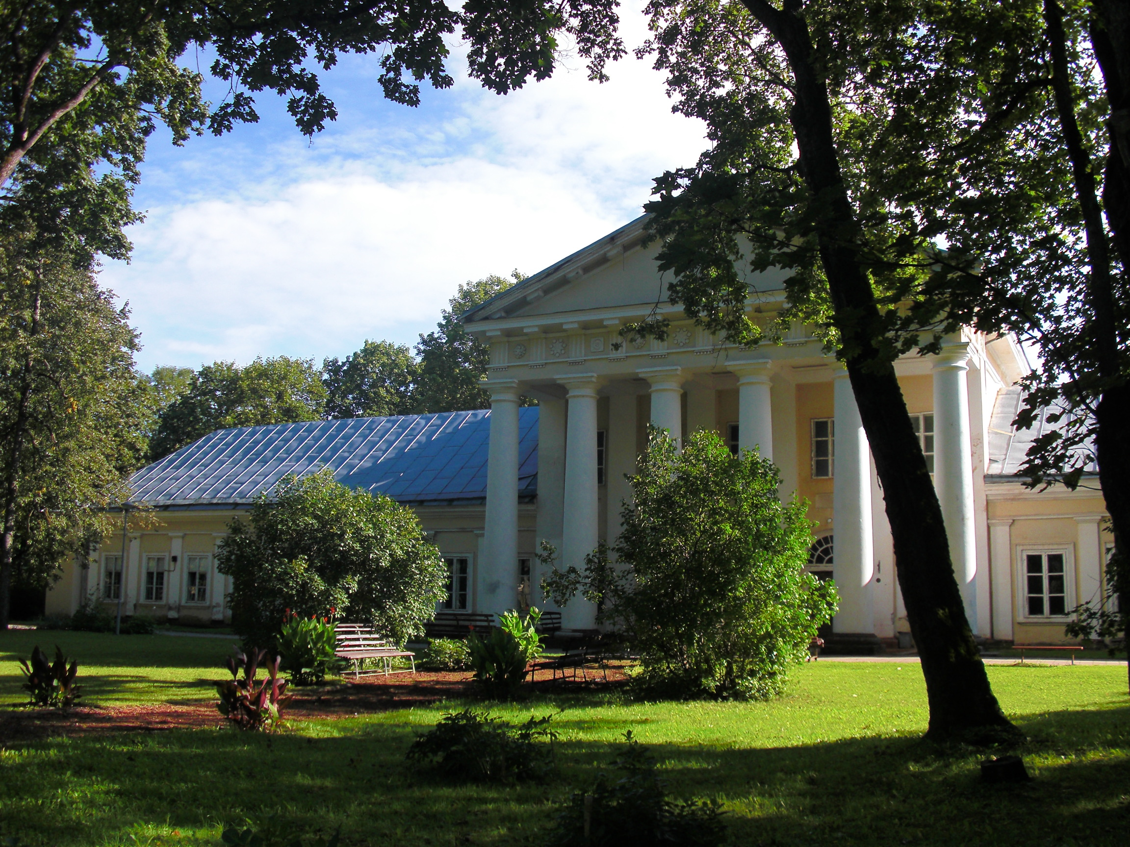 Salų dvaras